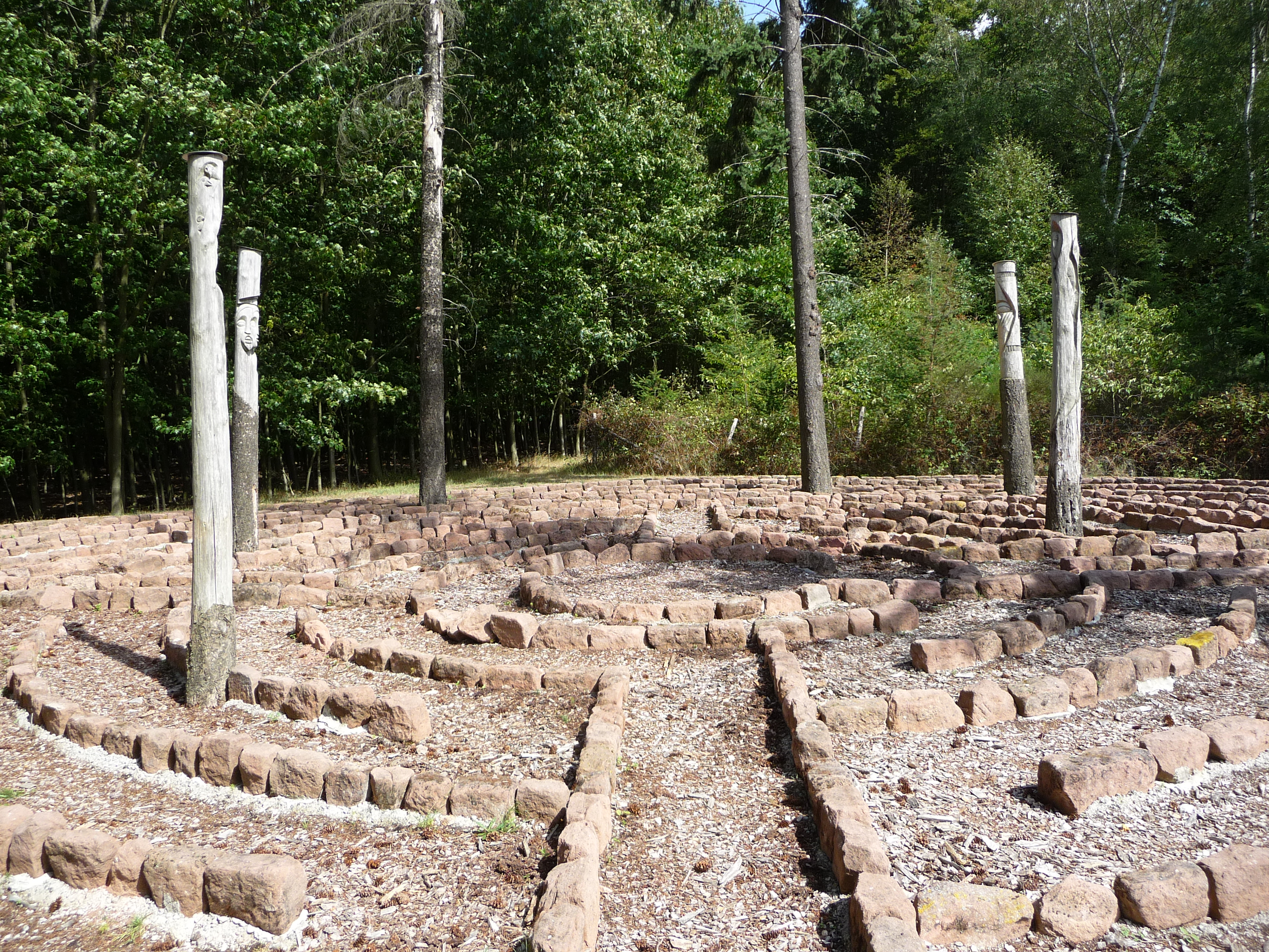 Die Stationen des 4,5 km langen Rundweges Lebenspfad Alsenborn orientieren sich an vorhandene Elemente in der Natur und sind jeweils mit einem Text gestaltet, der Situationen und Stationen menschlichen Lebens in den Blick nimmt.